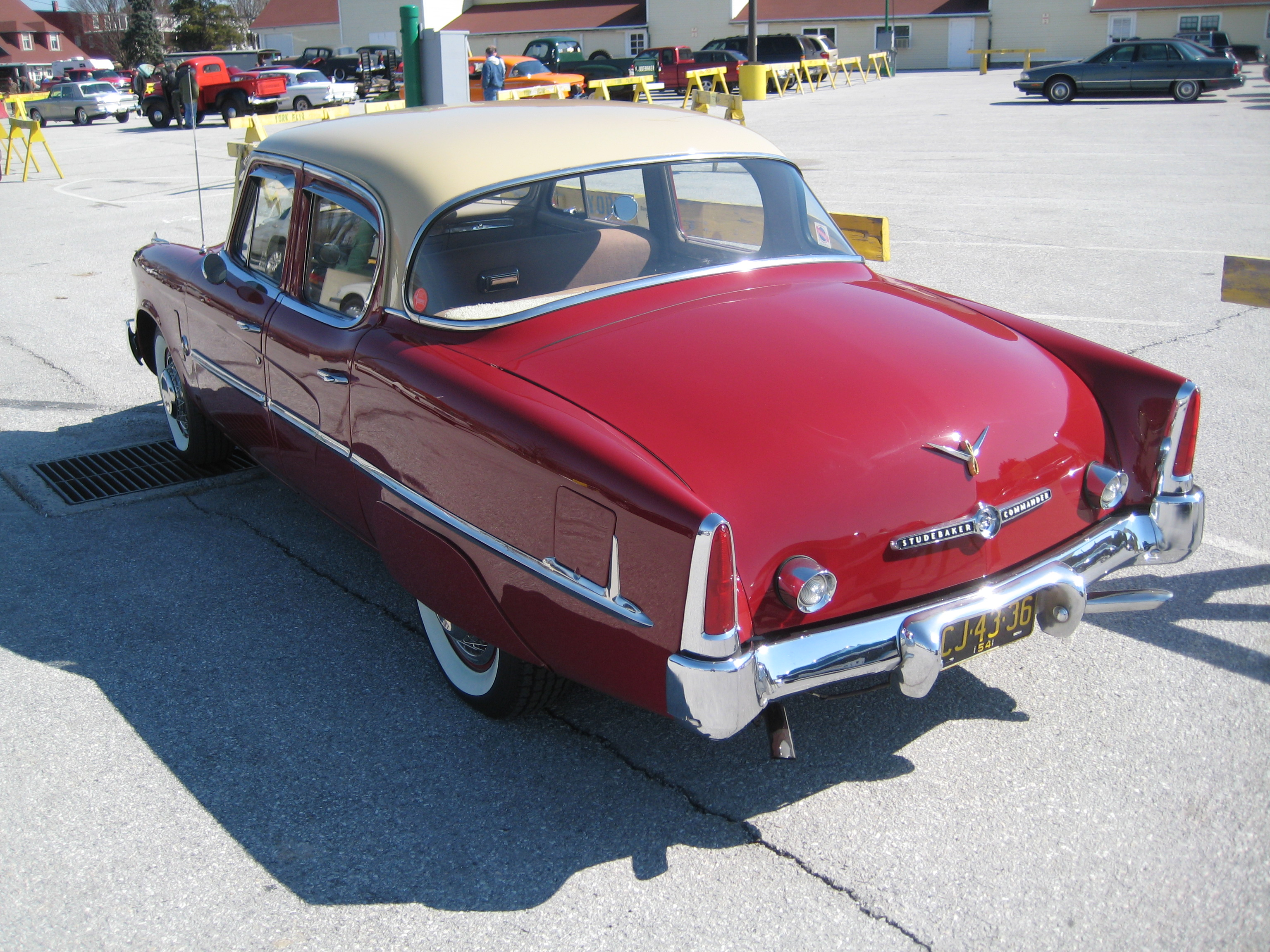 1954 Studebaker Commander